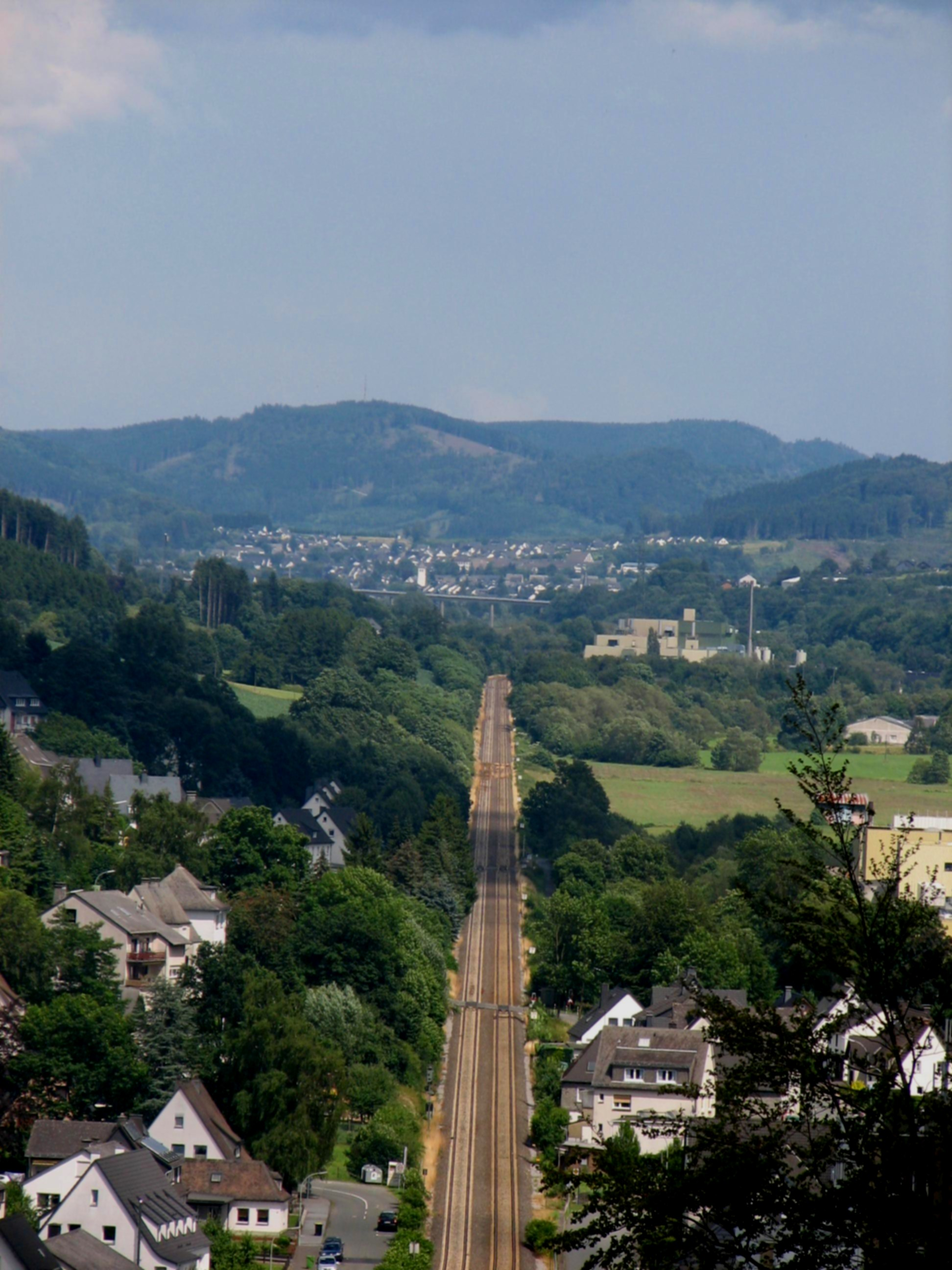 Meschede Ruhrtalbahn